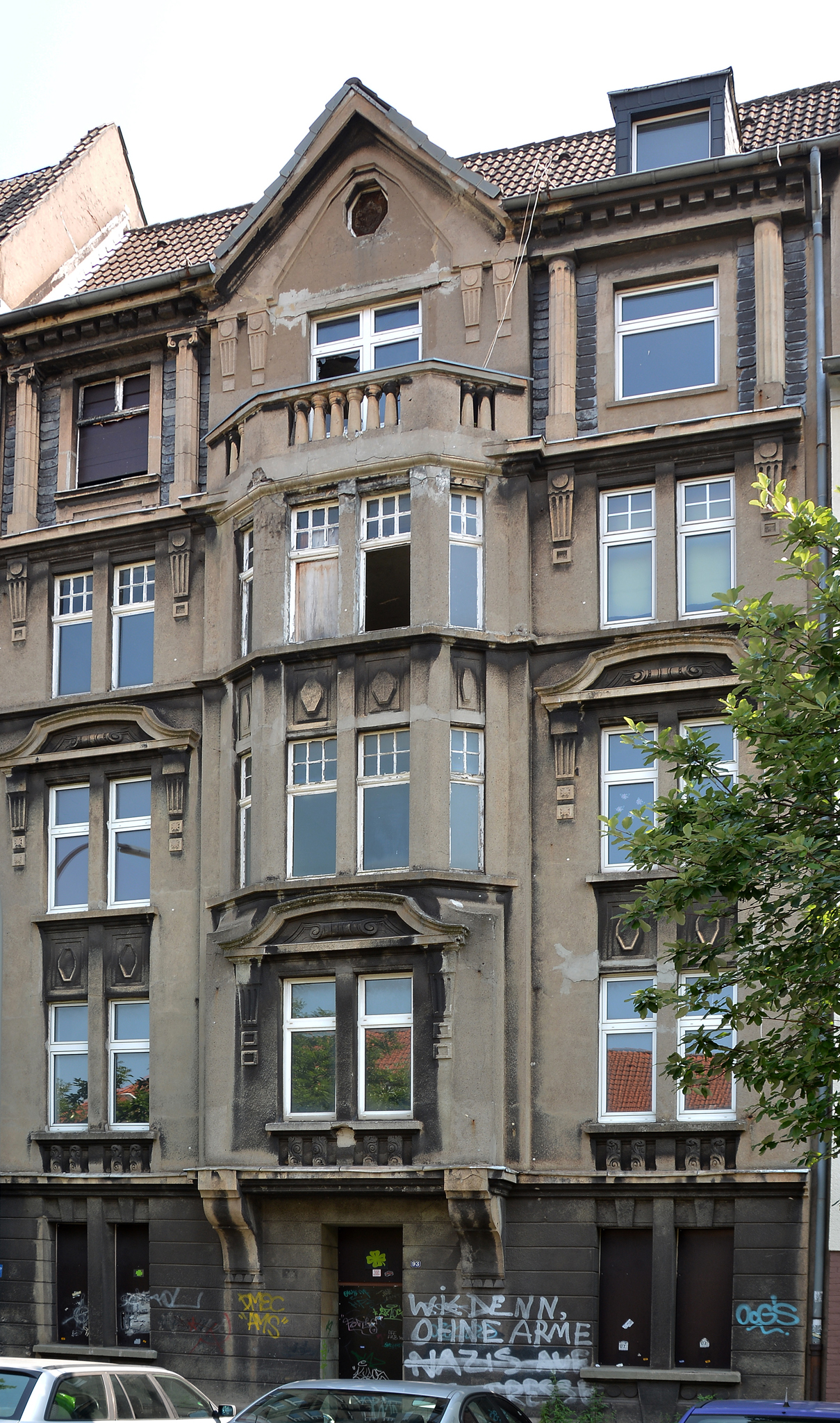 Wohnhaus von Eugen u. Johanna Schnog, Gneisenaustr 93